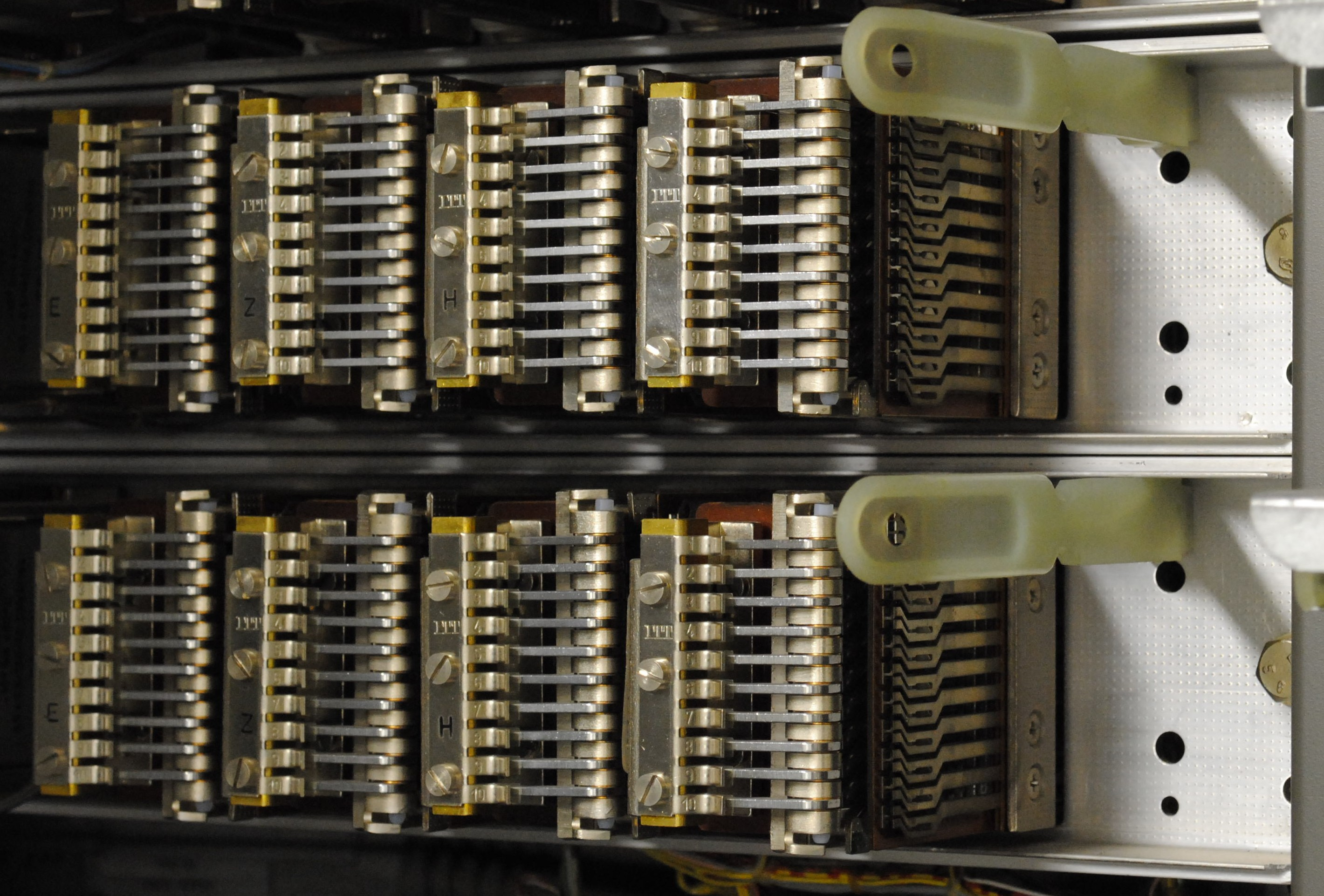 Zählmagneten in einem Großcitomat vom Hersteller SEL.